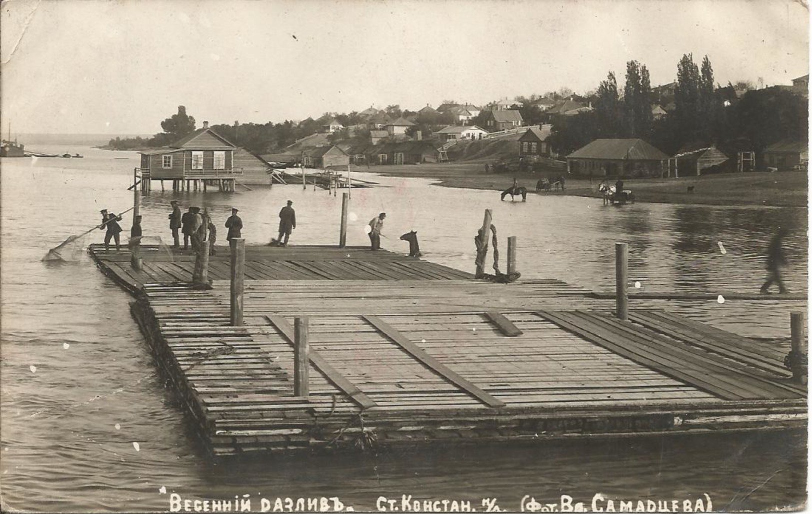 Весенний разлив в станице Константиновская (ныне - г. Константиновск)